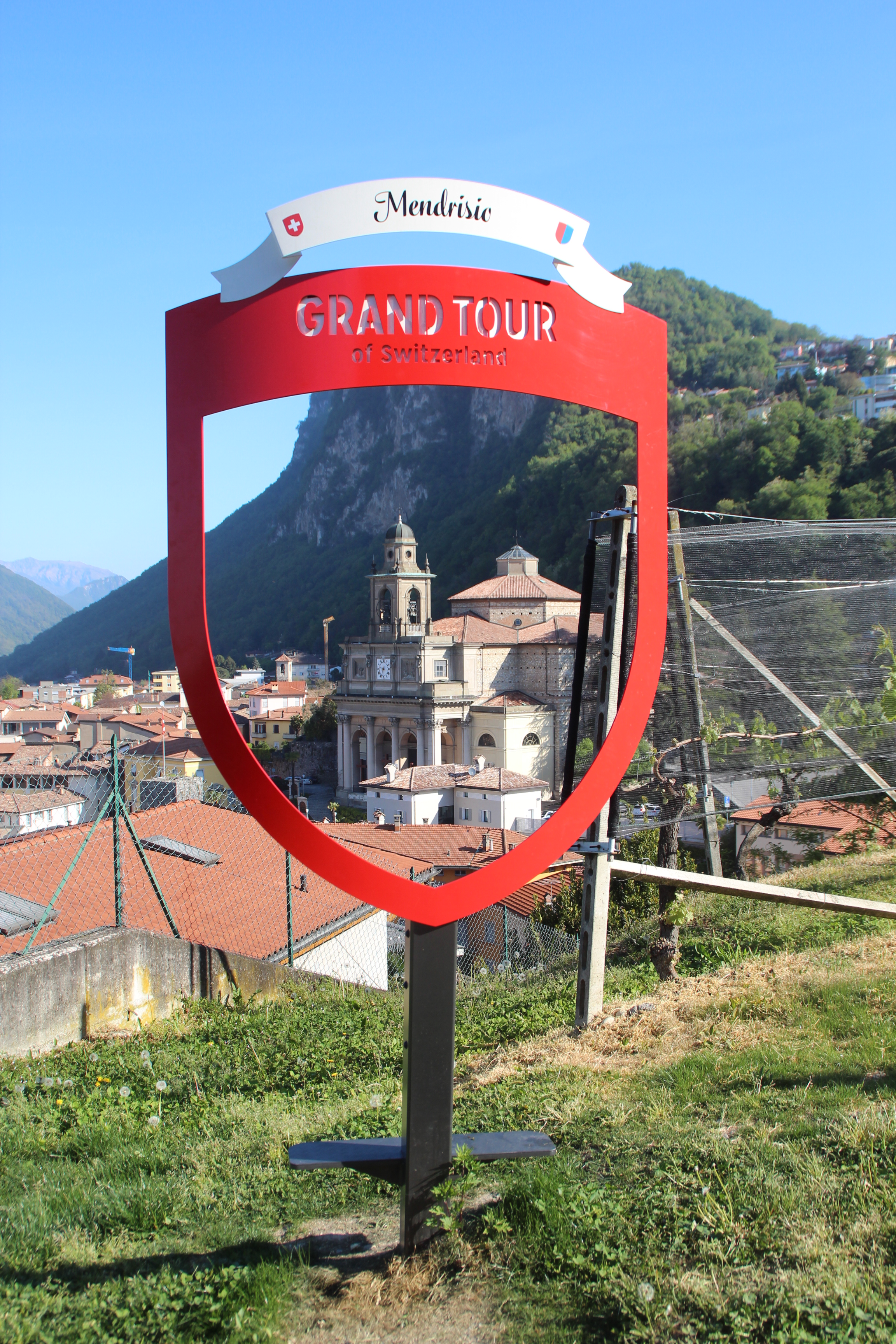 Grand Tour-Schild in Mendrisio TI